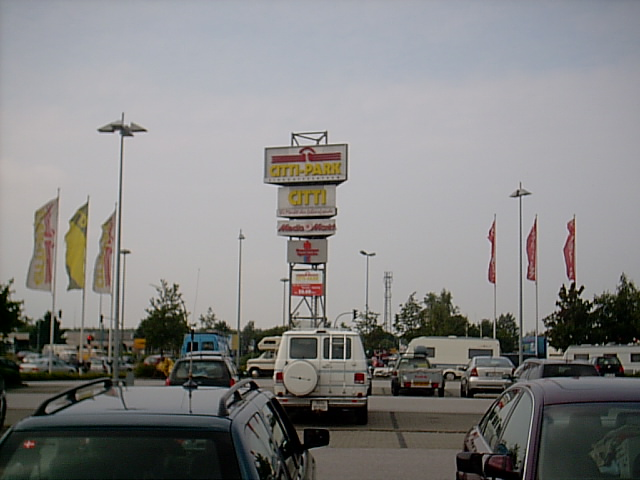 Bild på en skylt för Citti-Park i Flensburg. Bild tagen av mig själv.